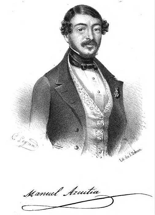 Ritratto di Manuel Lopez de Azcutia - litografia di Juan Donon pubblicata nell'edizione del 1848 del libro "La muerte de Jesus"